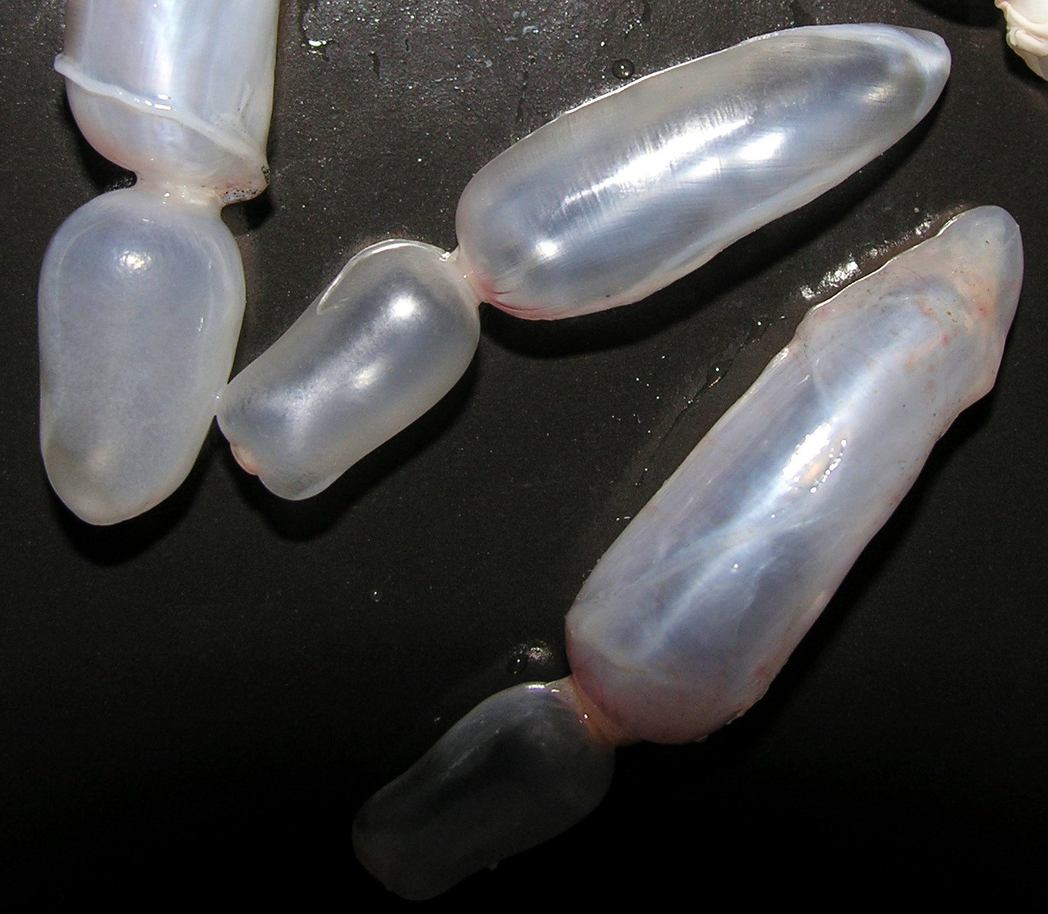 Plaukiojimo pūslė 2007 m.